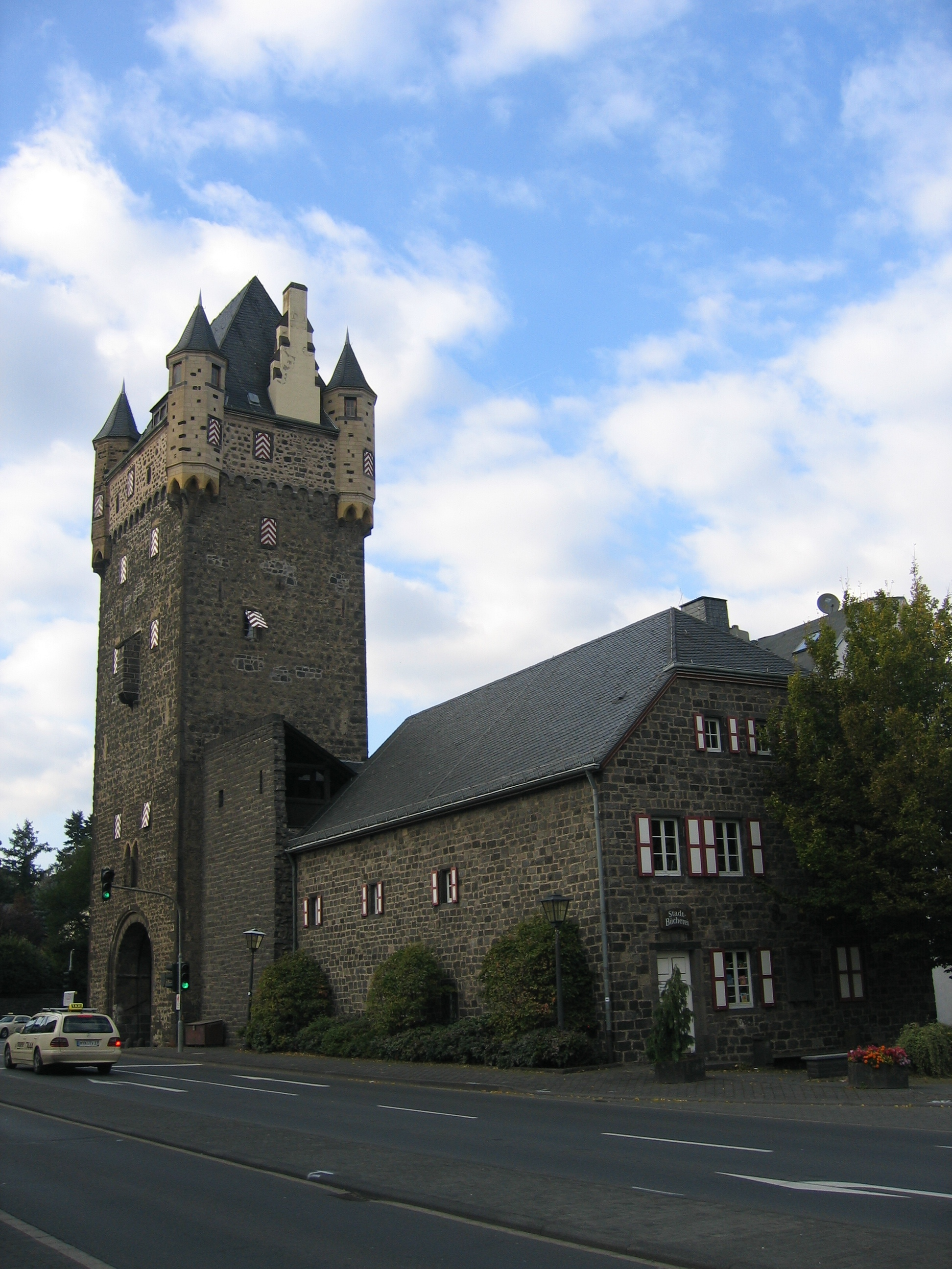 Das Obertor in Mayen